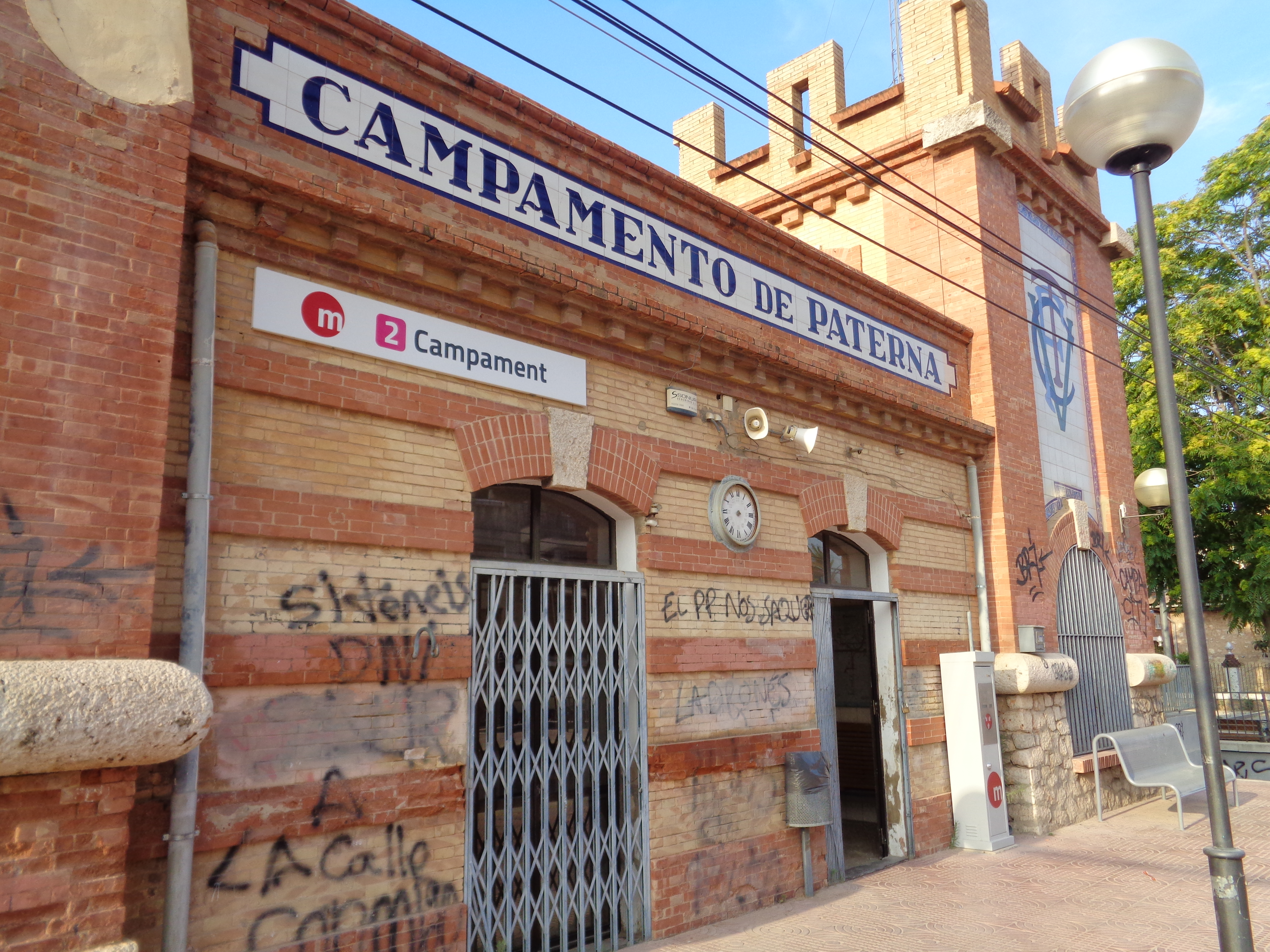 Estació de Campament, Paterna.